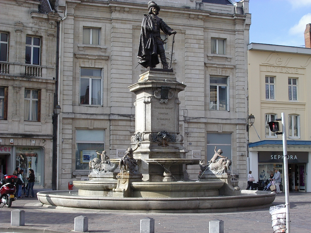 Fontaine et Statue de Charles de Gonzague à Charleville-Mézières en France